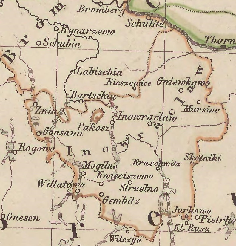 Kreis Inowrazlaw von 1772 bis 1818